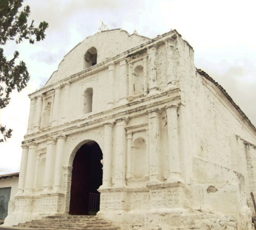 Iglesia de San Bartolomé Jocotenango, chiche, Guatemala